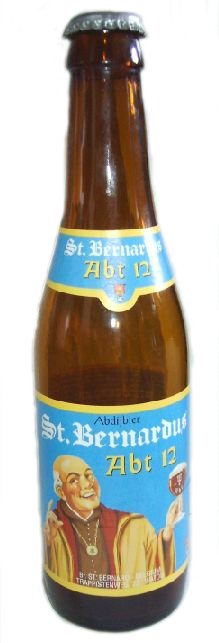 Belgian Abbey Beer, St. Bernadus 10% alc.